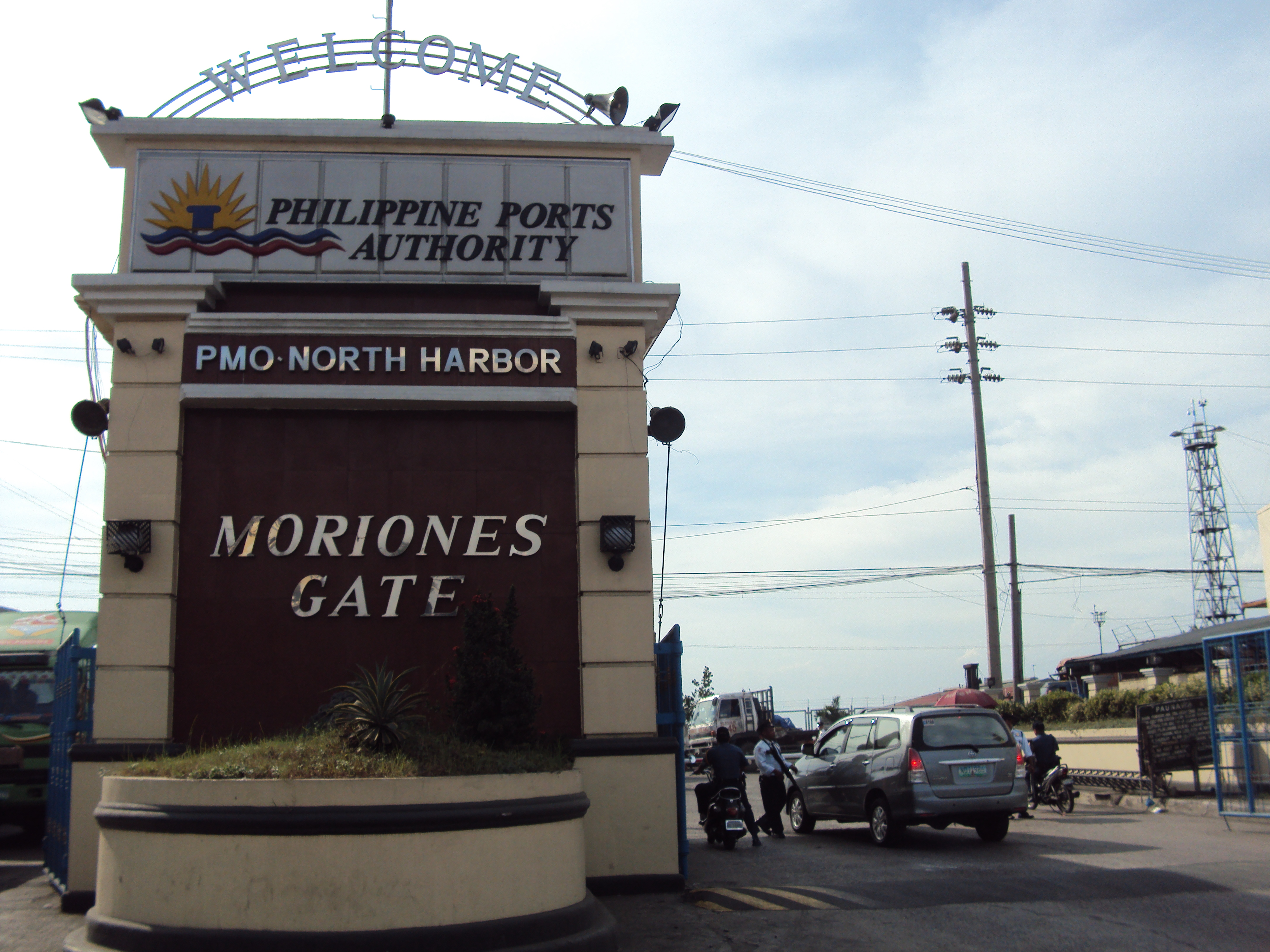 Philippine Ports Authority in Manila, Philippines